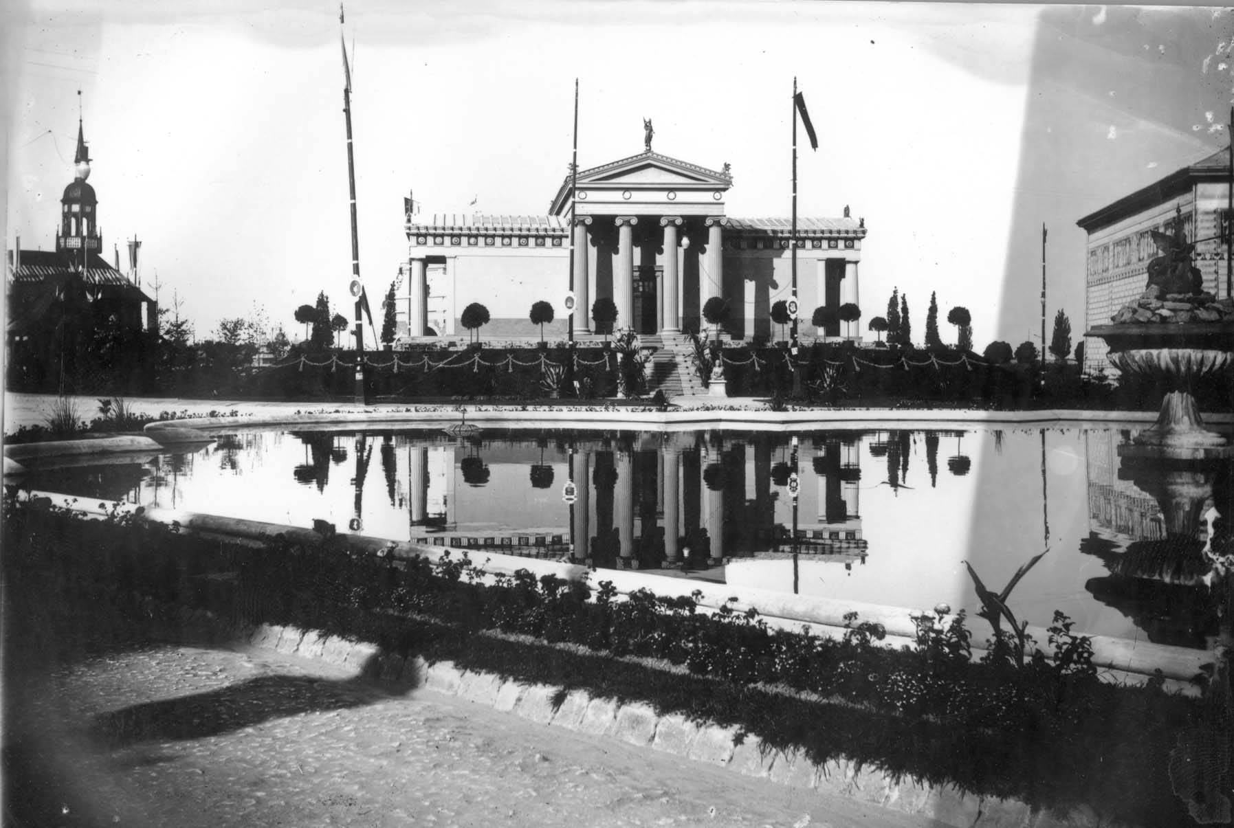 Павільйон архітектури на Галицькій крайовій виставці у Львові 1894 року. Архітектор Франциск Сковрон.